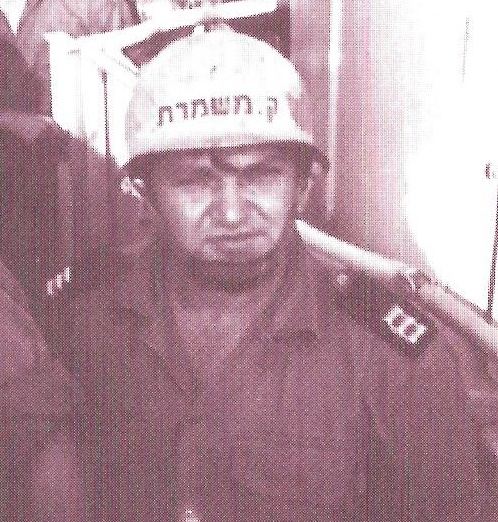 סרן זאב גולדצקי 1972